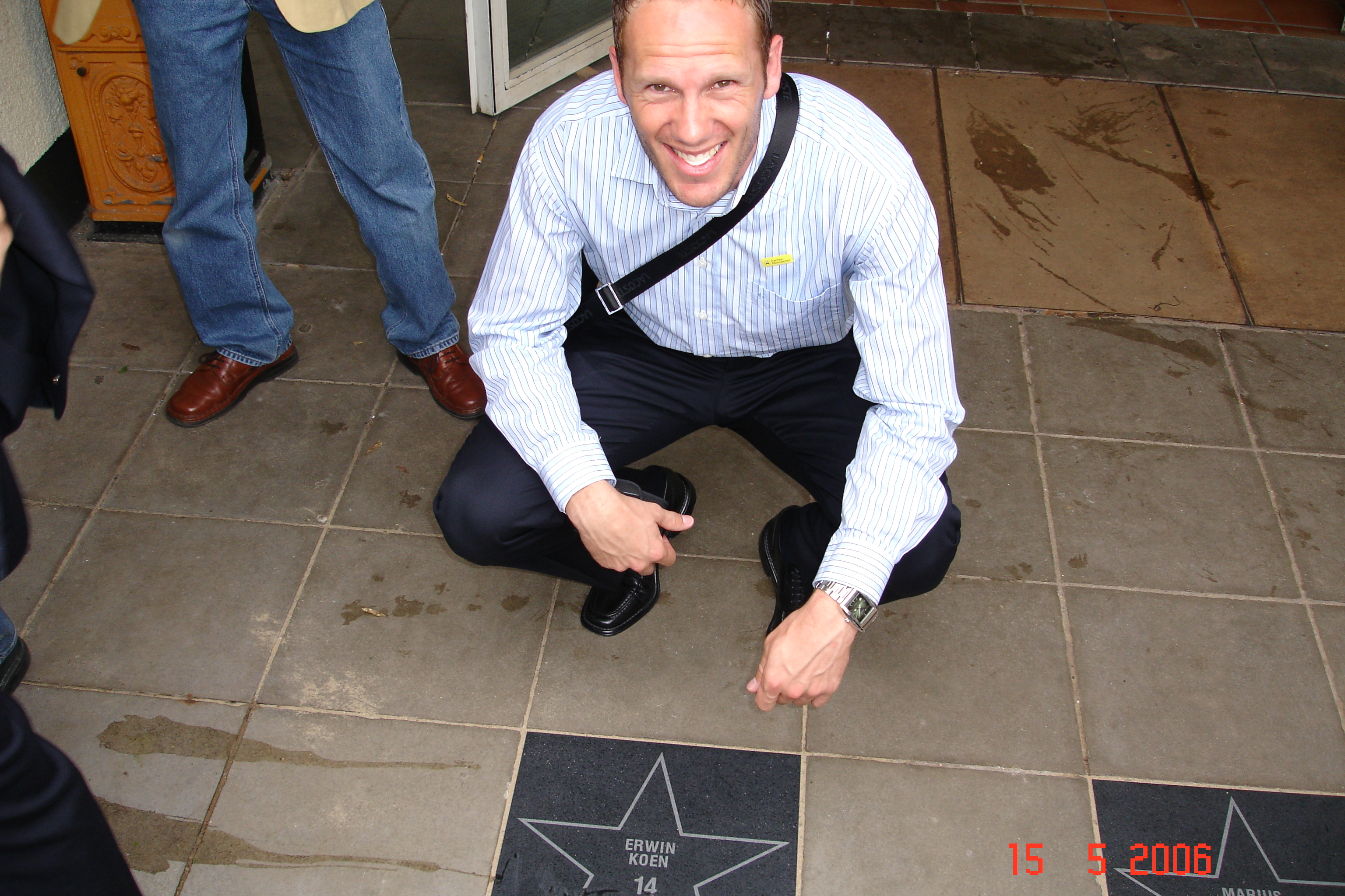 Geschenk na promotie bundesliga met Alemannia Aachen.